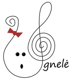 Choro Ugnelė logotipas